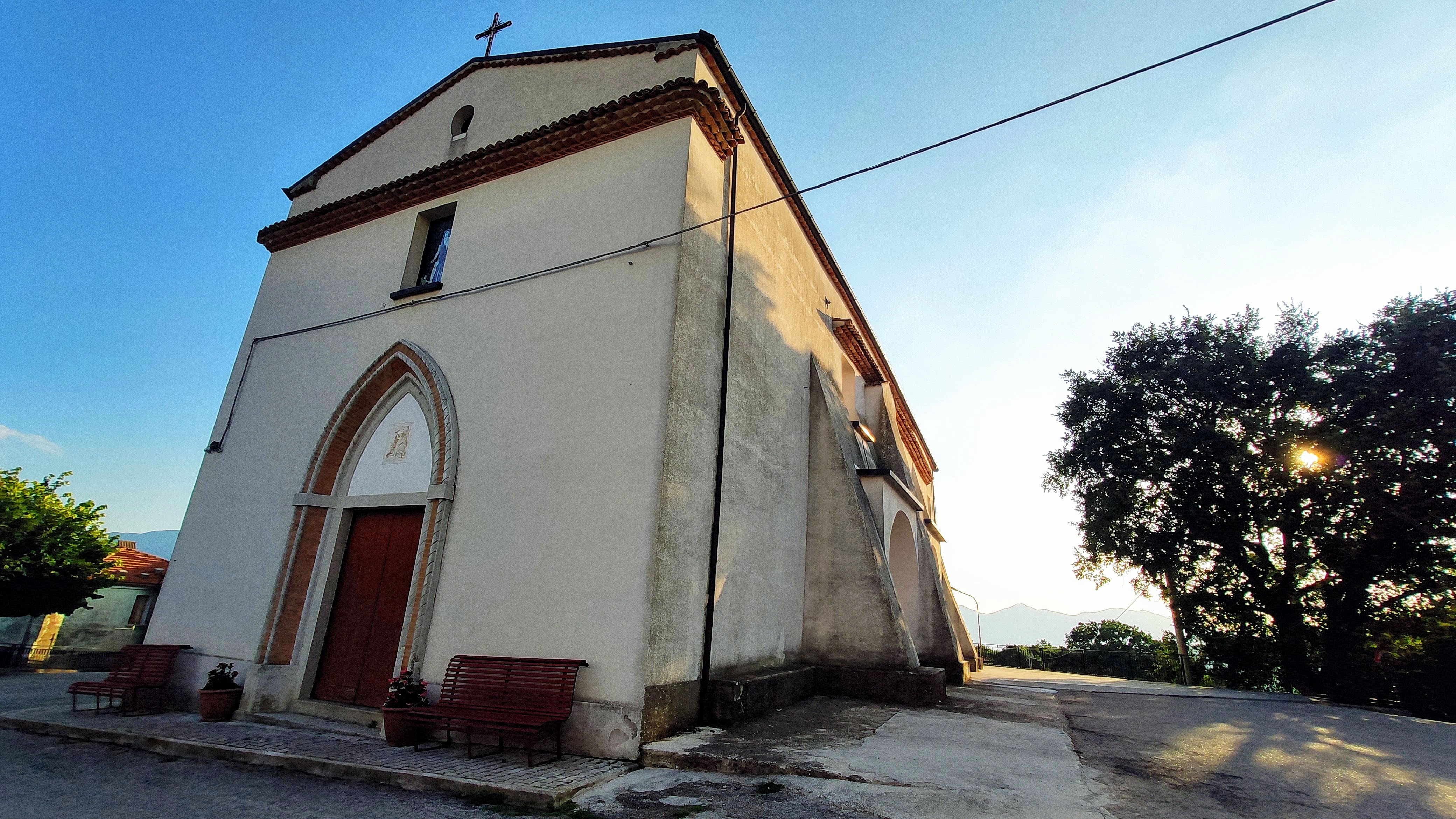 Chiesa di San Giovanni Battista, patrono di Spinete (CB)